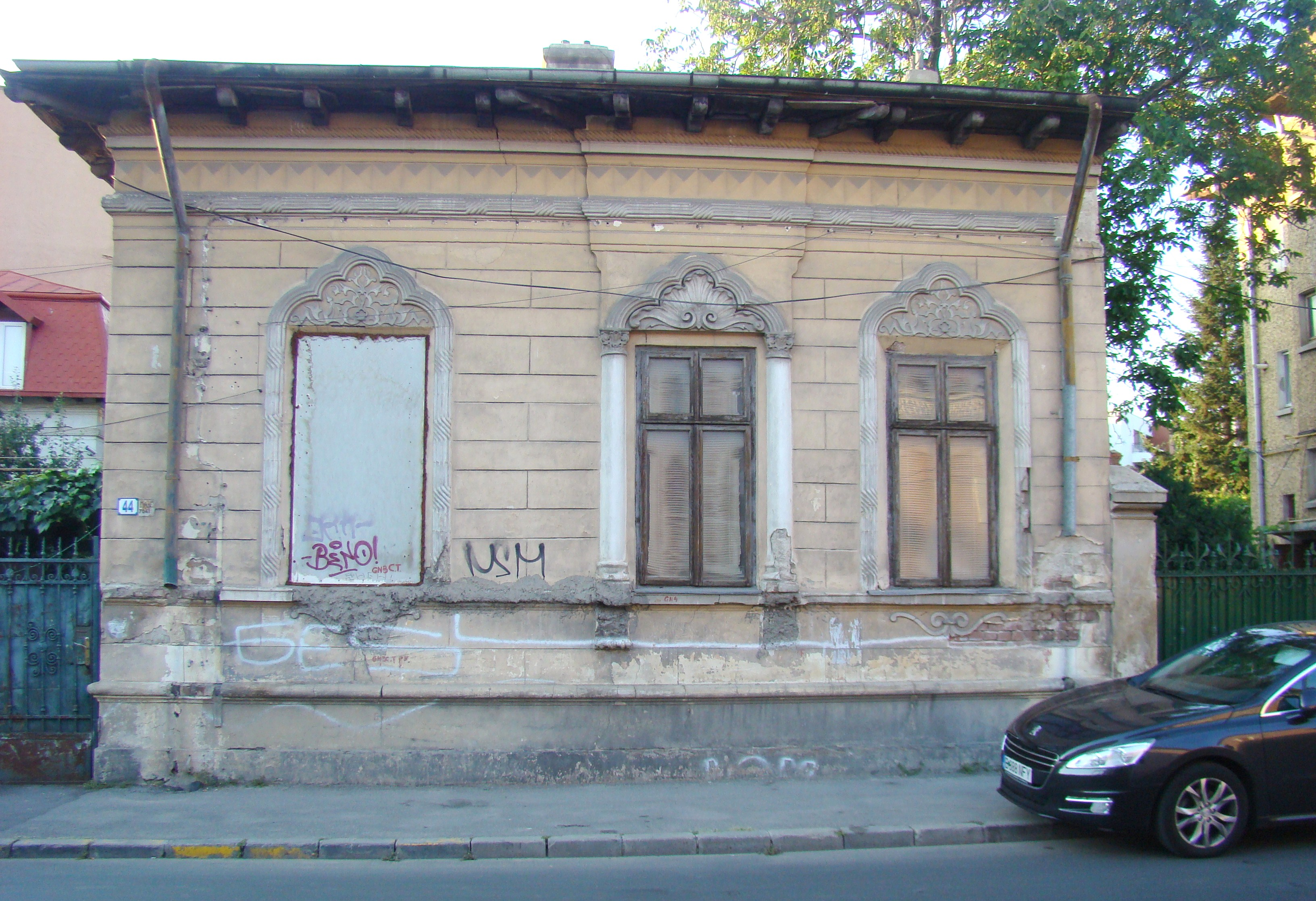 Clădire monument istoric, str. Mircea Vulcănescu, nr.44